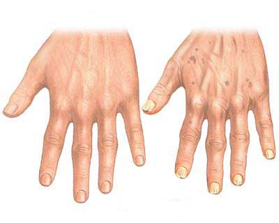 Старіння шкіри та ногтей руки людини